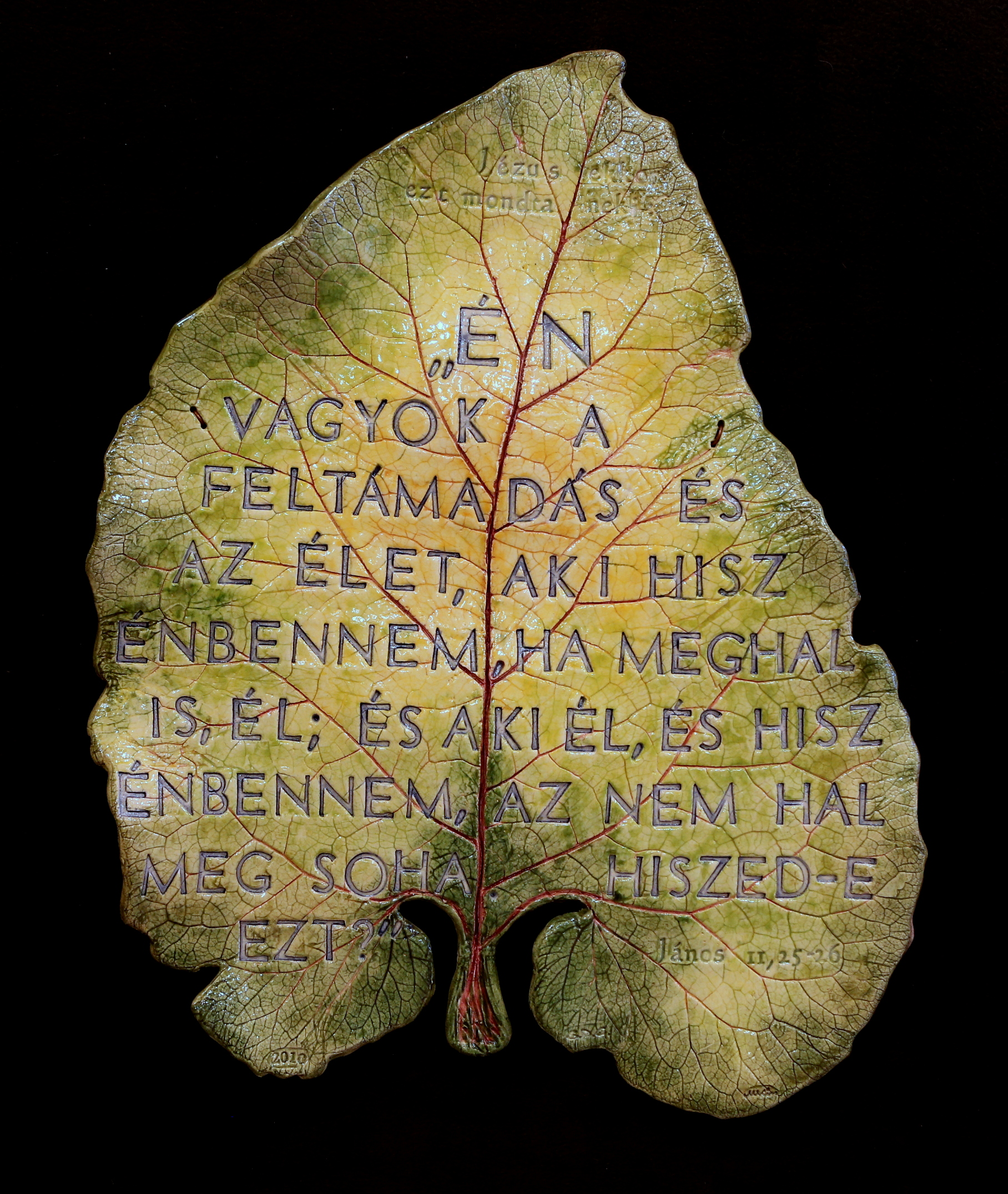 M. Kiss Katalin alkotása